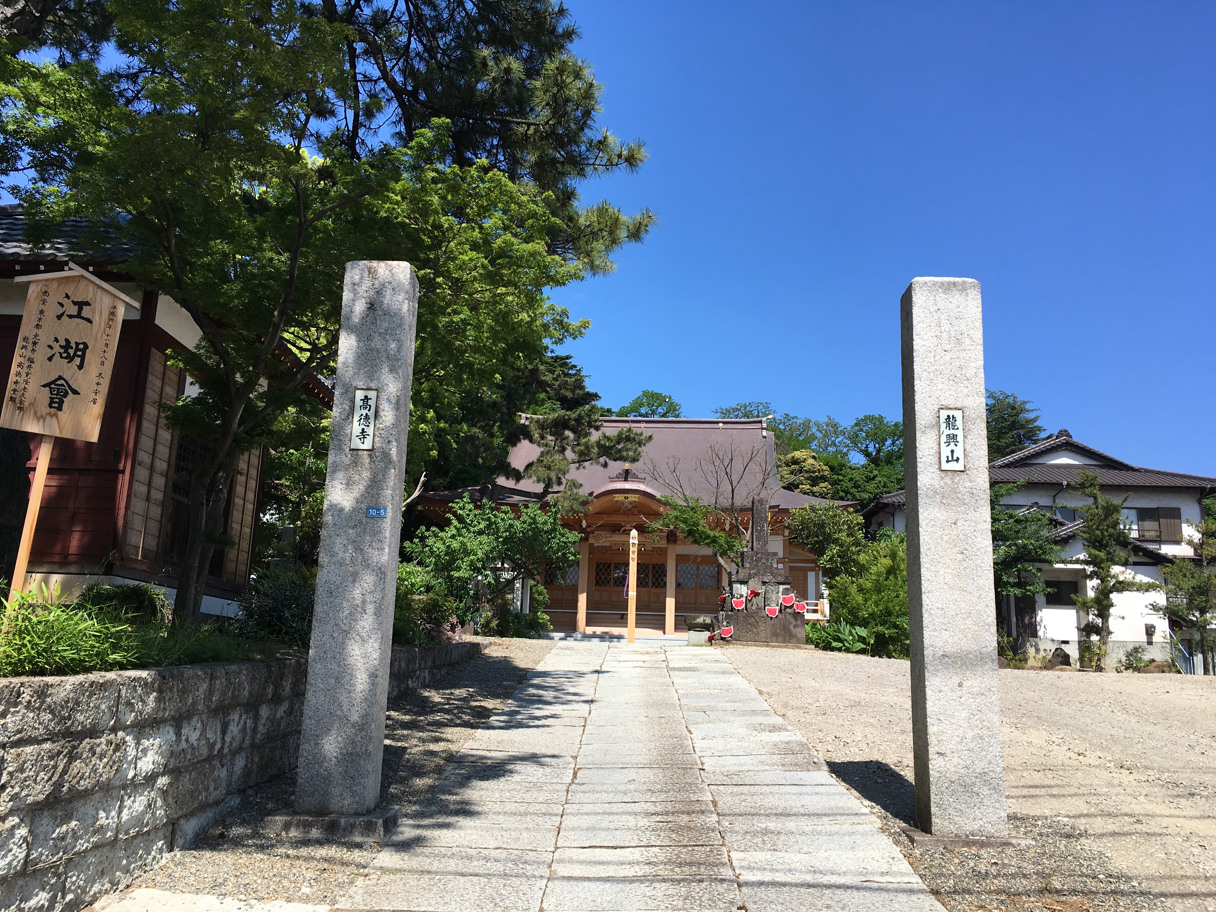 門のところから見た高徳寺